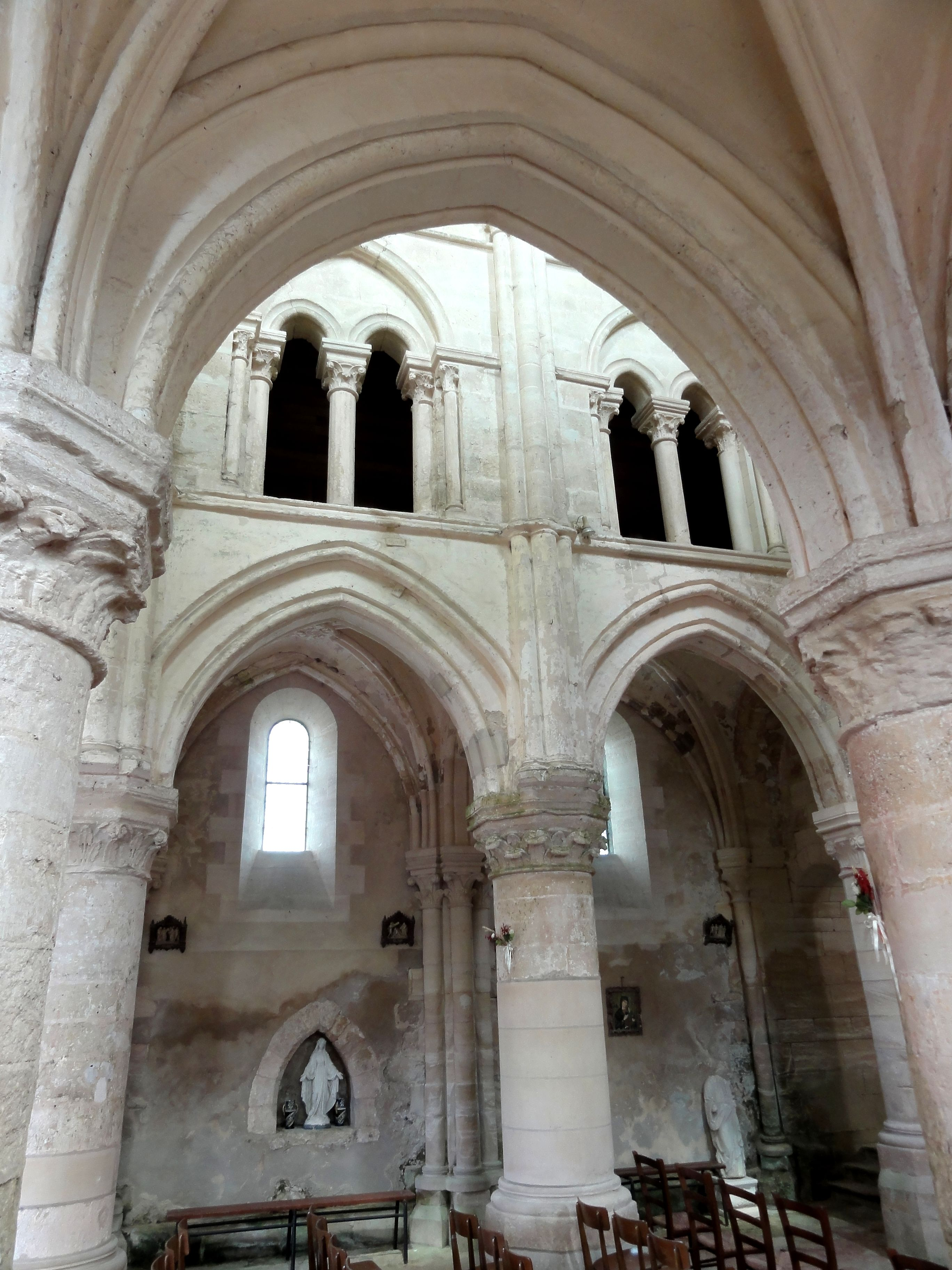 Bas-côté sud, vue par la seconde grande arcade.